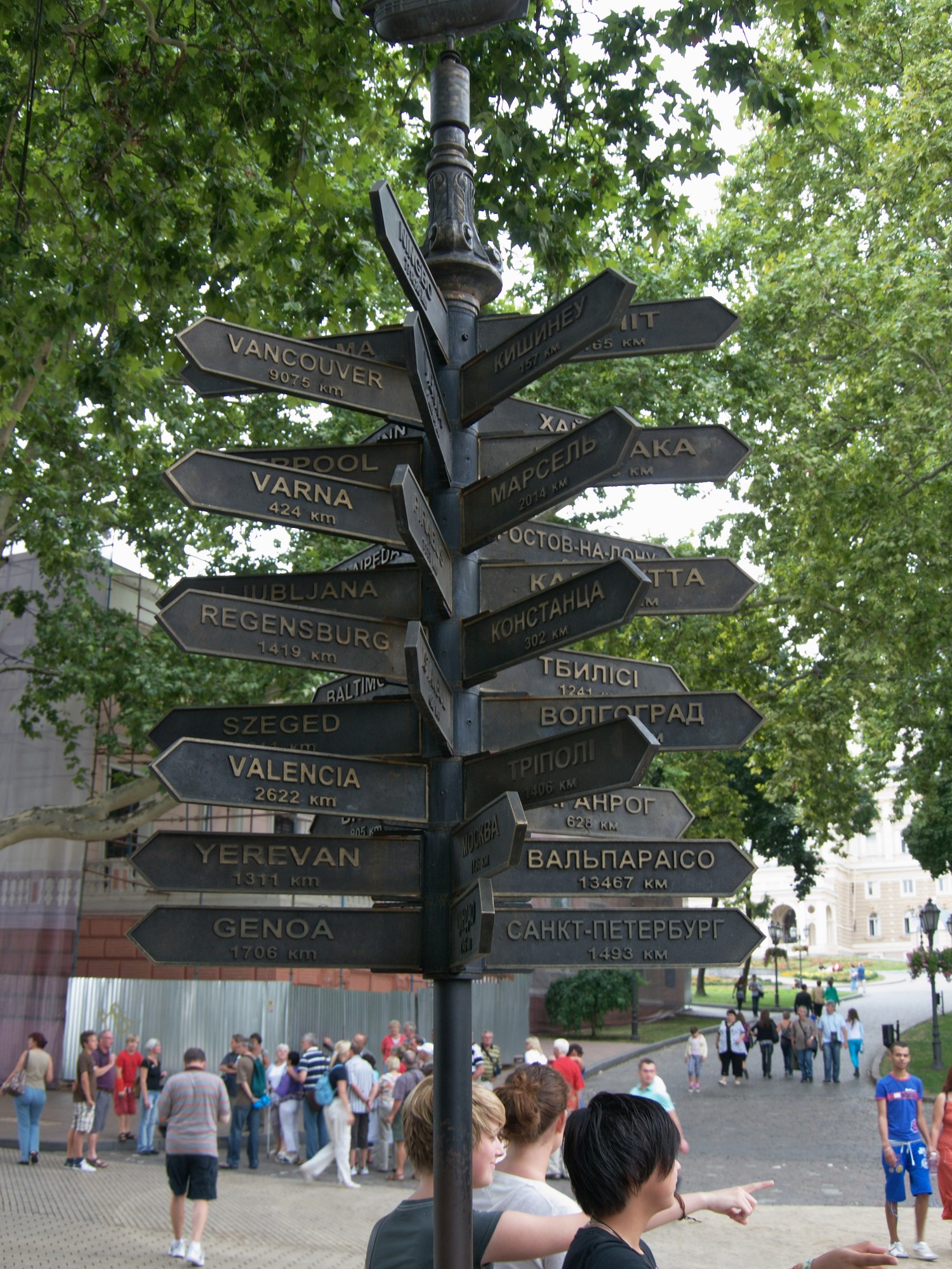 Richtungsanzeiger der Partnerstädte von Odessa